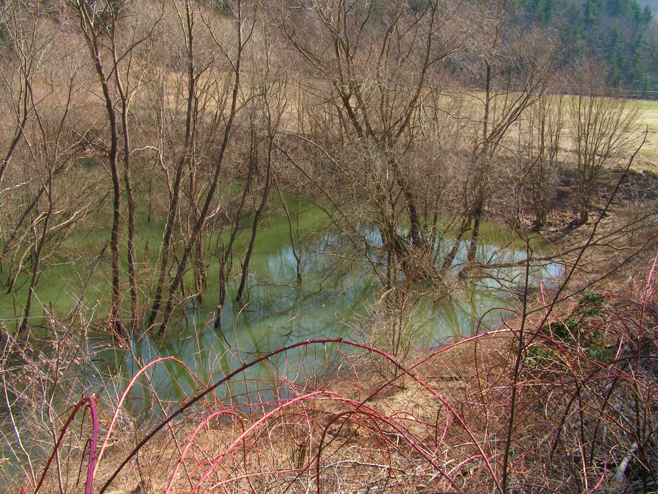 Jarné vody v zátope tajchu Brenner